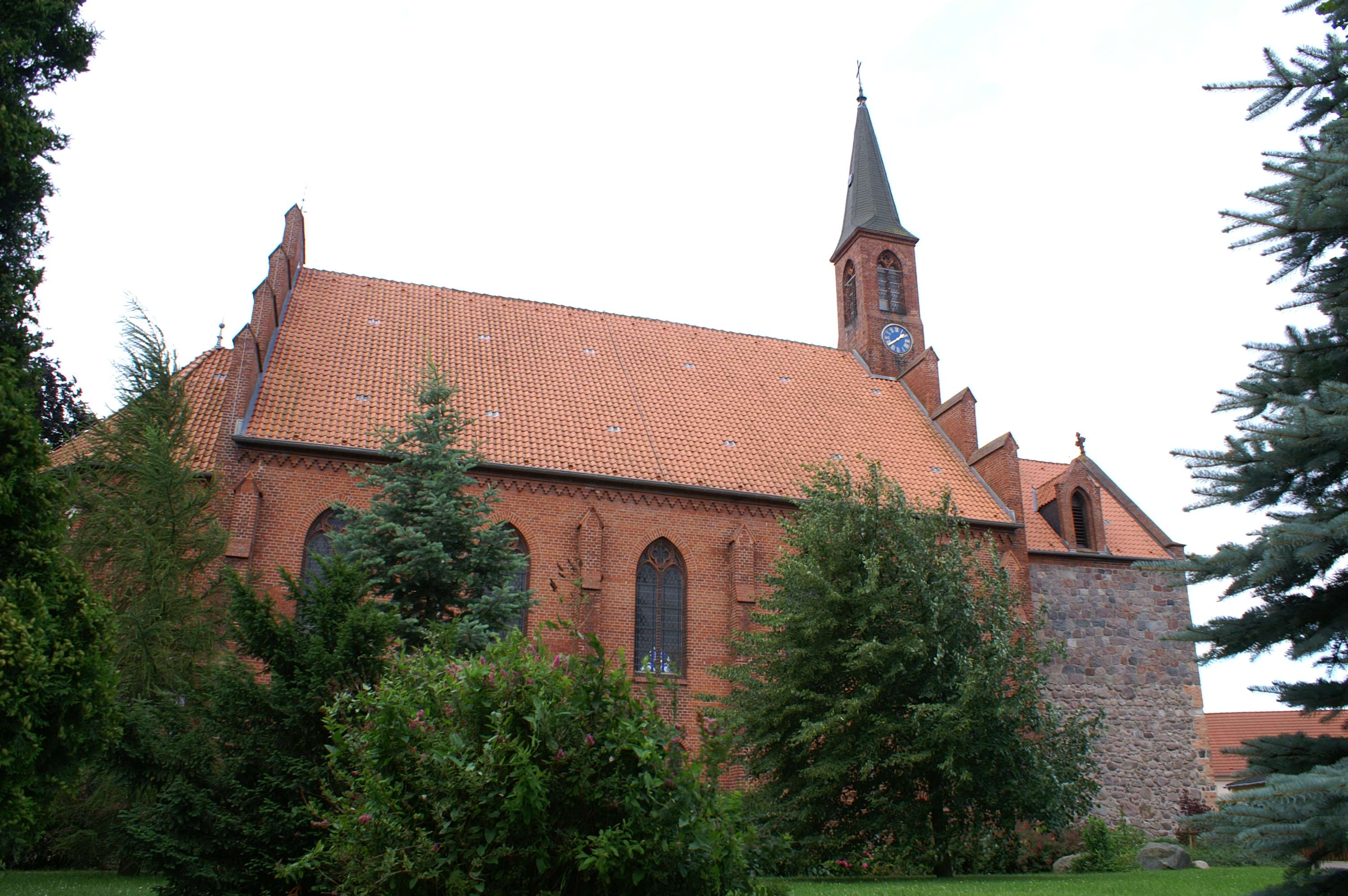 Jarmen - Landkreis Demmin - Kirche - Nordseite